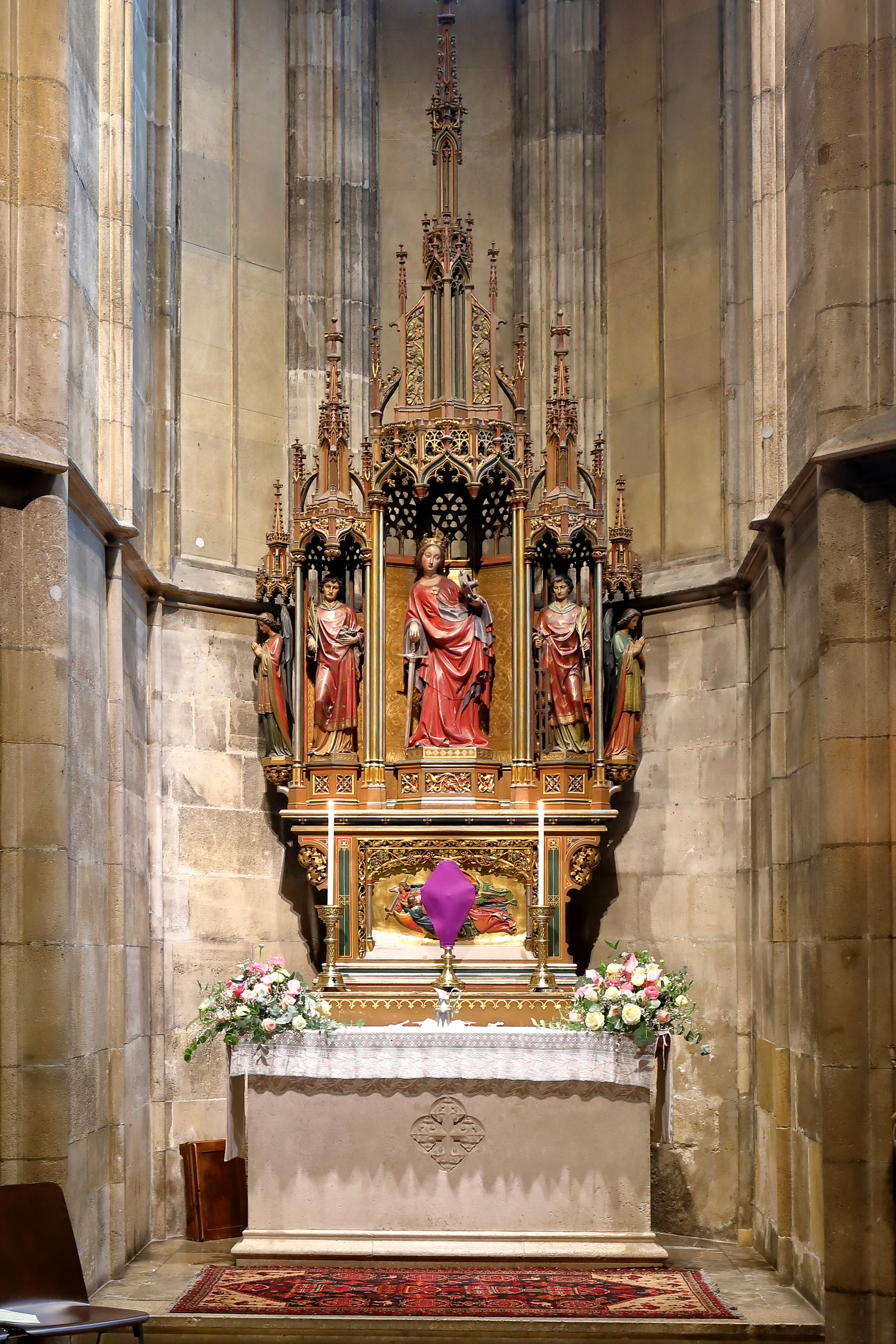 Der Katharinenaltar in der Katharinen- bzw. Taufkapelle des Stephansdomes in der österreichischen Bundeshauptstadt Wien.Die ostseitig an die Turmhalle des Südturm angebaute Kapelle wurde um 1380 errichtet. Der neugotische Altar wurde um 1875 errichtet, in dessen Zentrum sich eine Holzstatue (um 1425) der hl. Katharina befindet. Seit 1639 (mit Unterbrechung) ist auch der marmorne gotische Taufstein (1481) in der Katharinenkapelle aufgestellt.